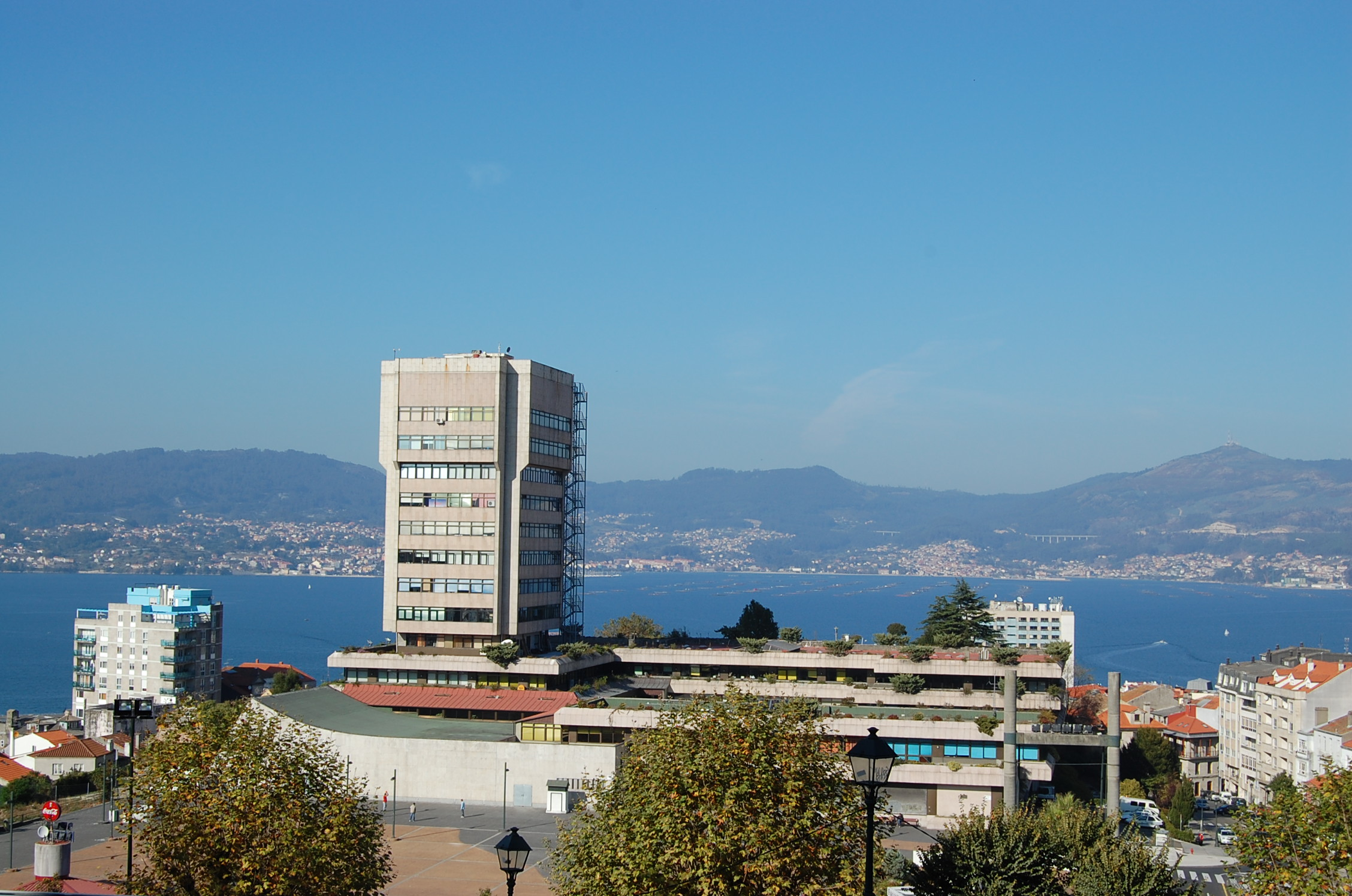 A sede da administração municipal de Vigo e a ria visto do monte do Castro.